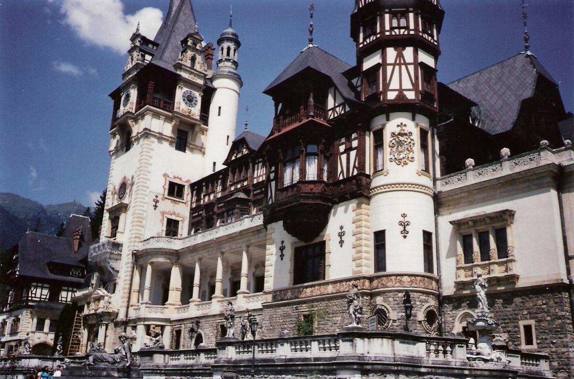 pelesh palace,sinaia,rumania 01